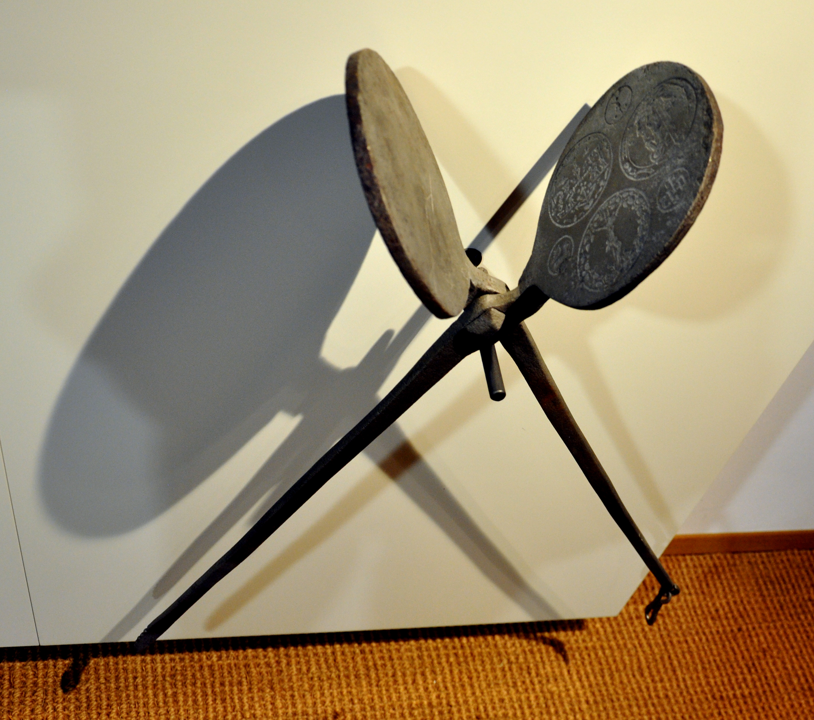 Hostieneisen, 18. Jahrhundert; Stadtmuseum Bad Saulgau